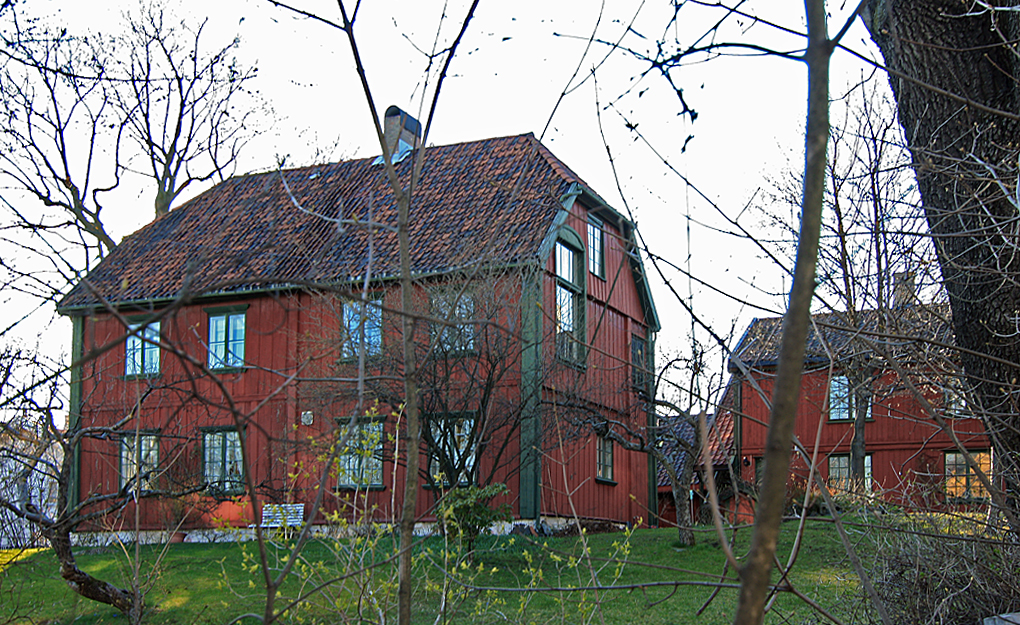 Bernerløkken, Majorstuveien 8, Oslo. Oppført på slutten av 1700-tallet. Freda. Maleren Amaldus Nielsens hjem fra 1870-åra.